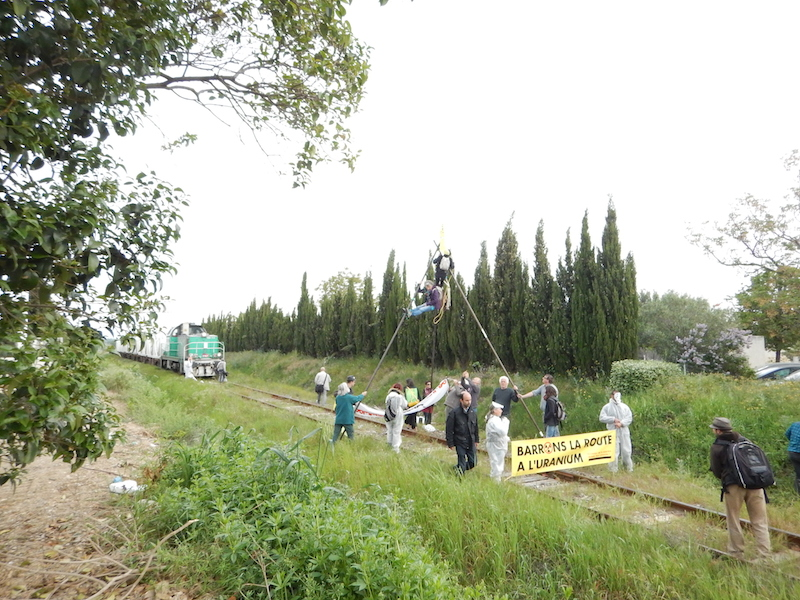 Une quarantaine de militants "stop uranium" bloquent un train d'uranium (UF4) sortant de l'usine Areva Malvési pour rejoindre la gare de triage de Narbonne.